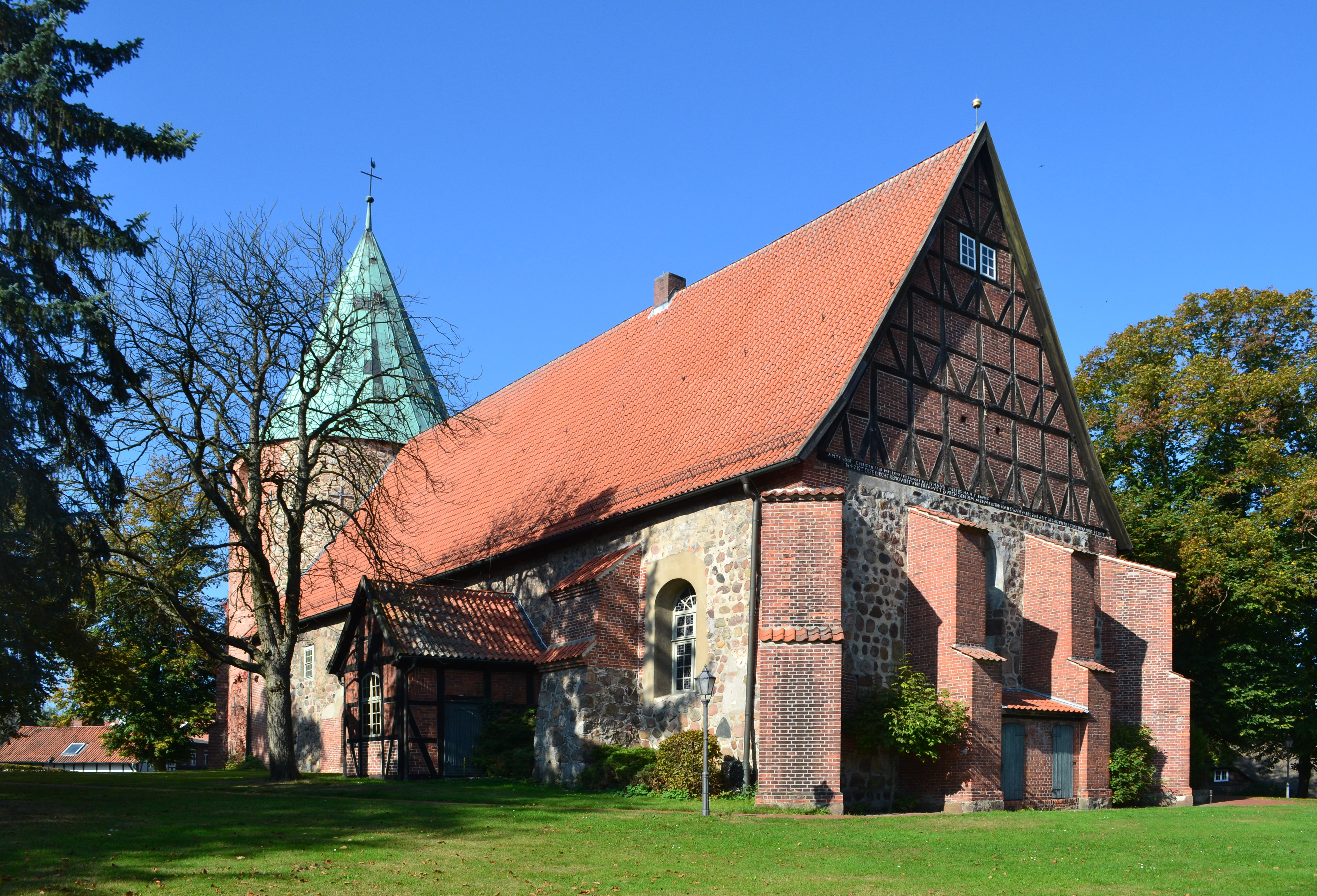 Kirche in Salzhausen.